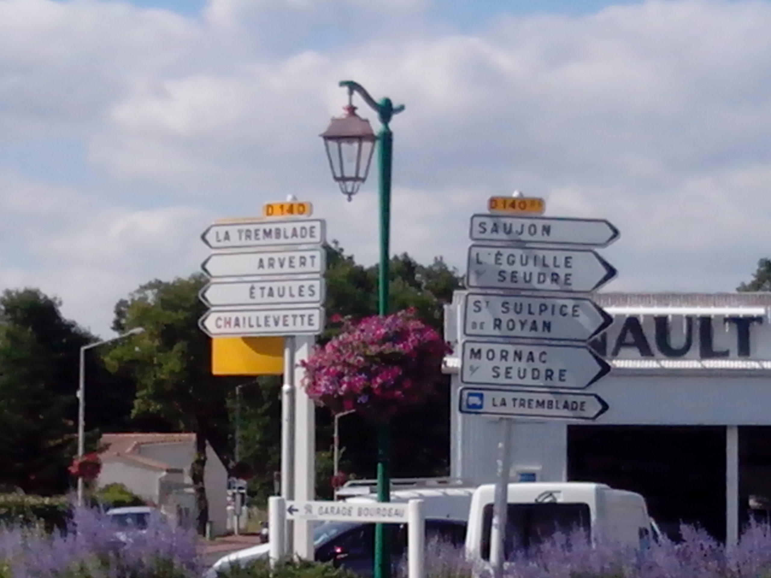 Panneaux routiers à Breuillet